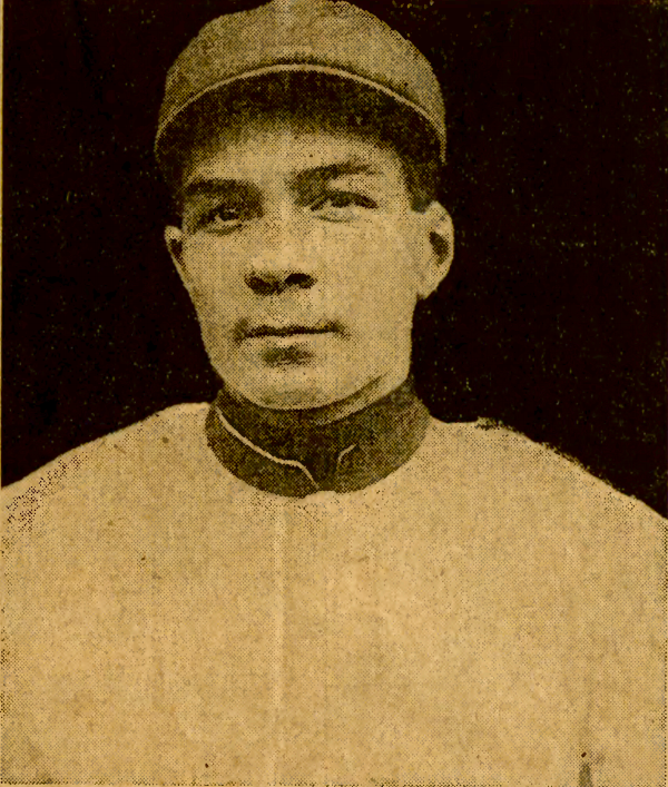 Tex Wisterzil in 1915.